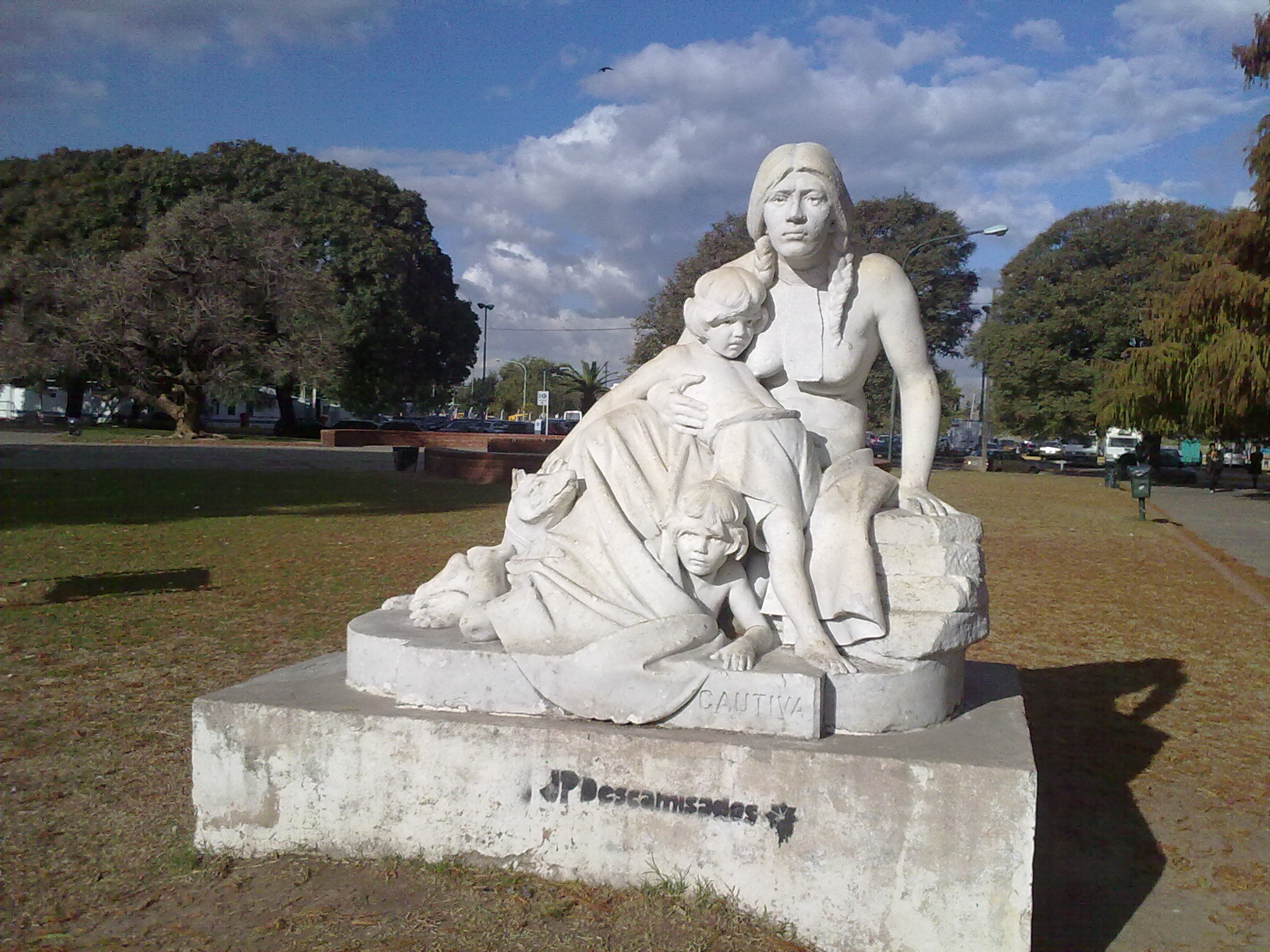 La Cautiva, de Lucio Correa morales, cerca de la facultad de Derecho, Av Pueyrredón y Figueroa Alcorta, en el Barrio de la Recoleta, Buenos Aires. La cautiva está sentada en un resto de pared de adobe, observando con dolor a lo lejos su morada, por sus hijos y un perro.